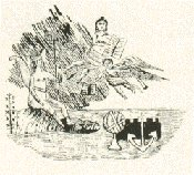 Escudo traidor por Francisco de Miranda en el año 1806.